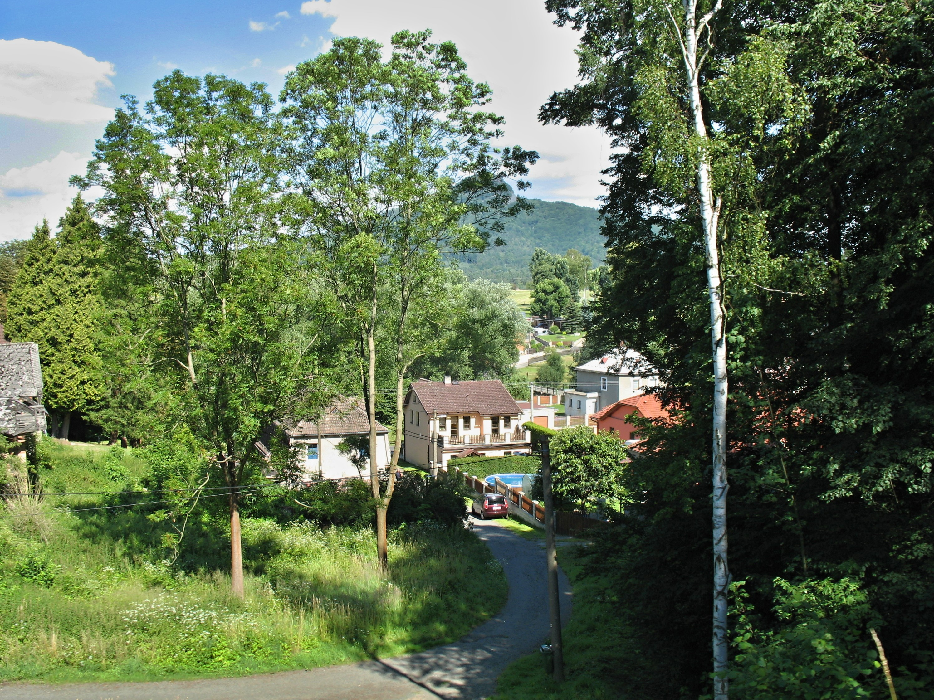 Pohled na obec a horu Ralsko od železniční zastávky